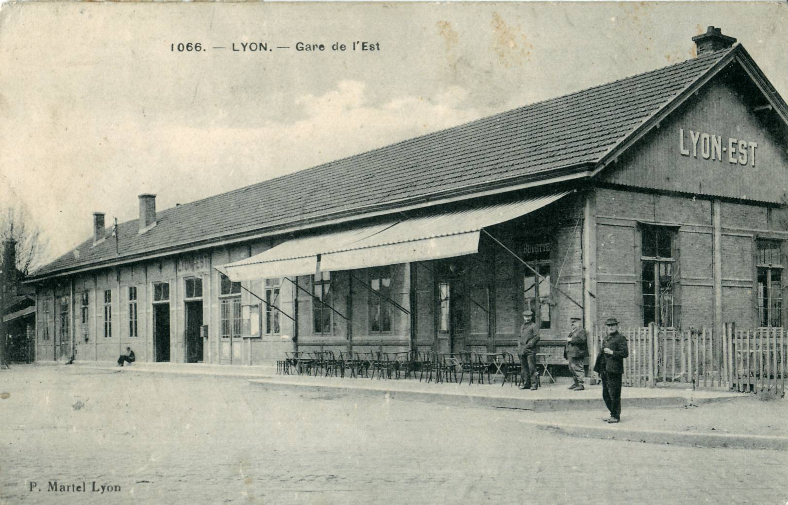 Carte postale ancienne éditée par Martel à Lyon, N°1066 Lyon - Gare de l'Est (Chemin de fer de l'Est de Lyon)